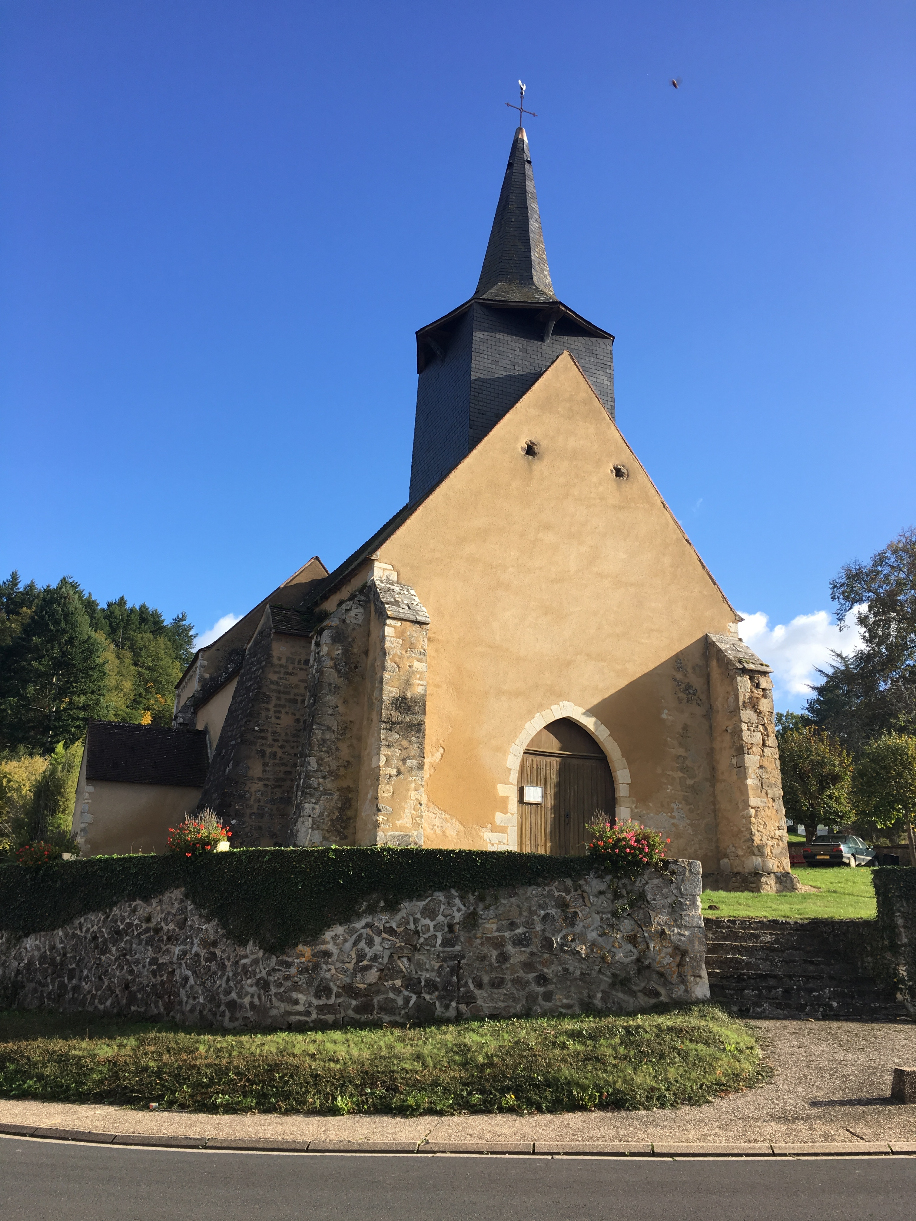 Badecon-le-Pin (36) : L'église du Pin au lieu dit Le Pin.